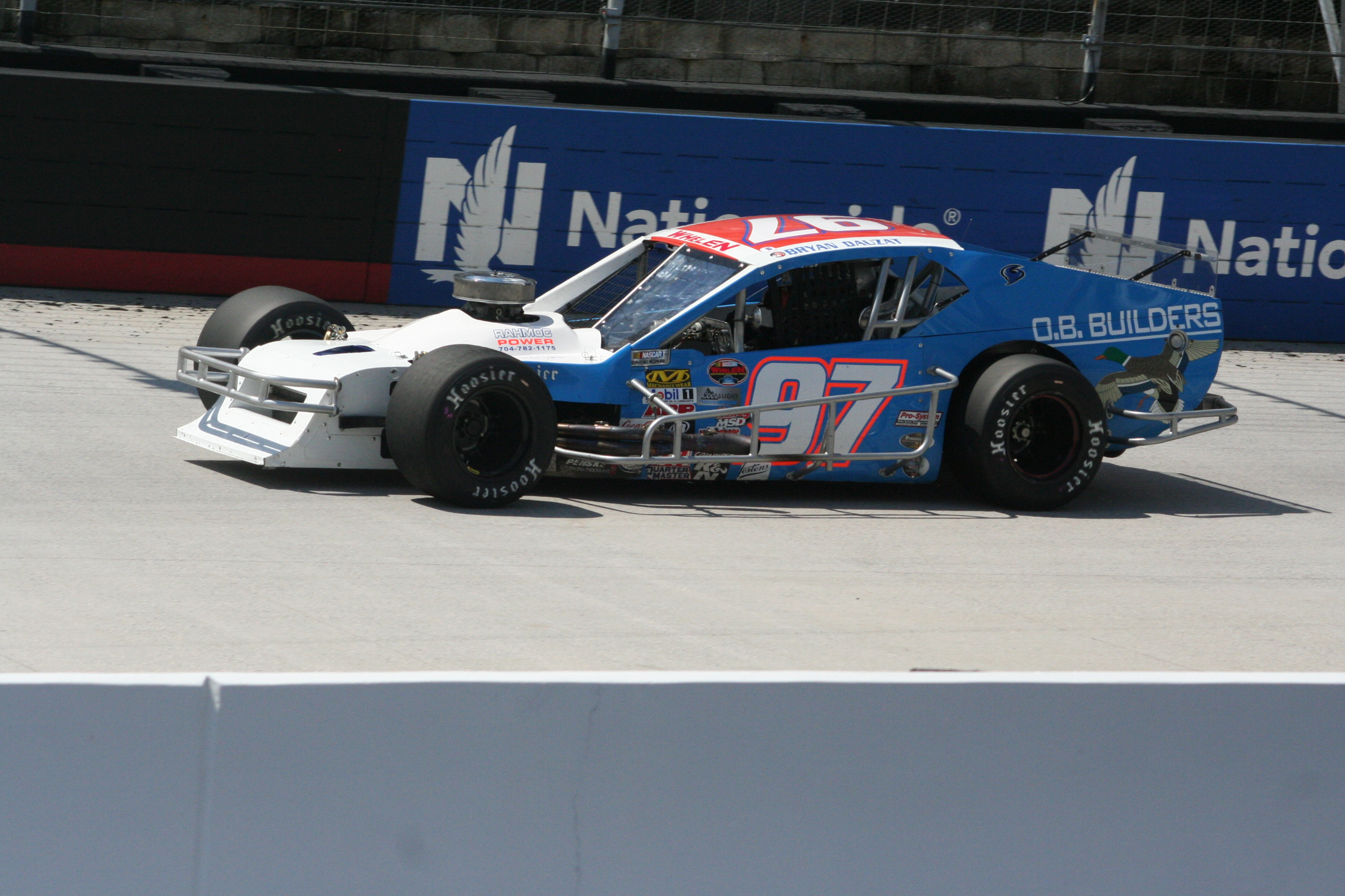 Bryan Dauzat